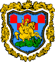 Wappen der Stadt Senj